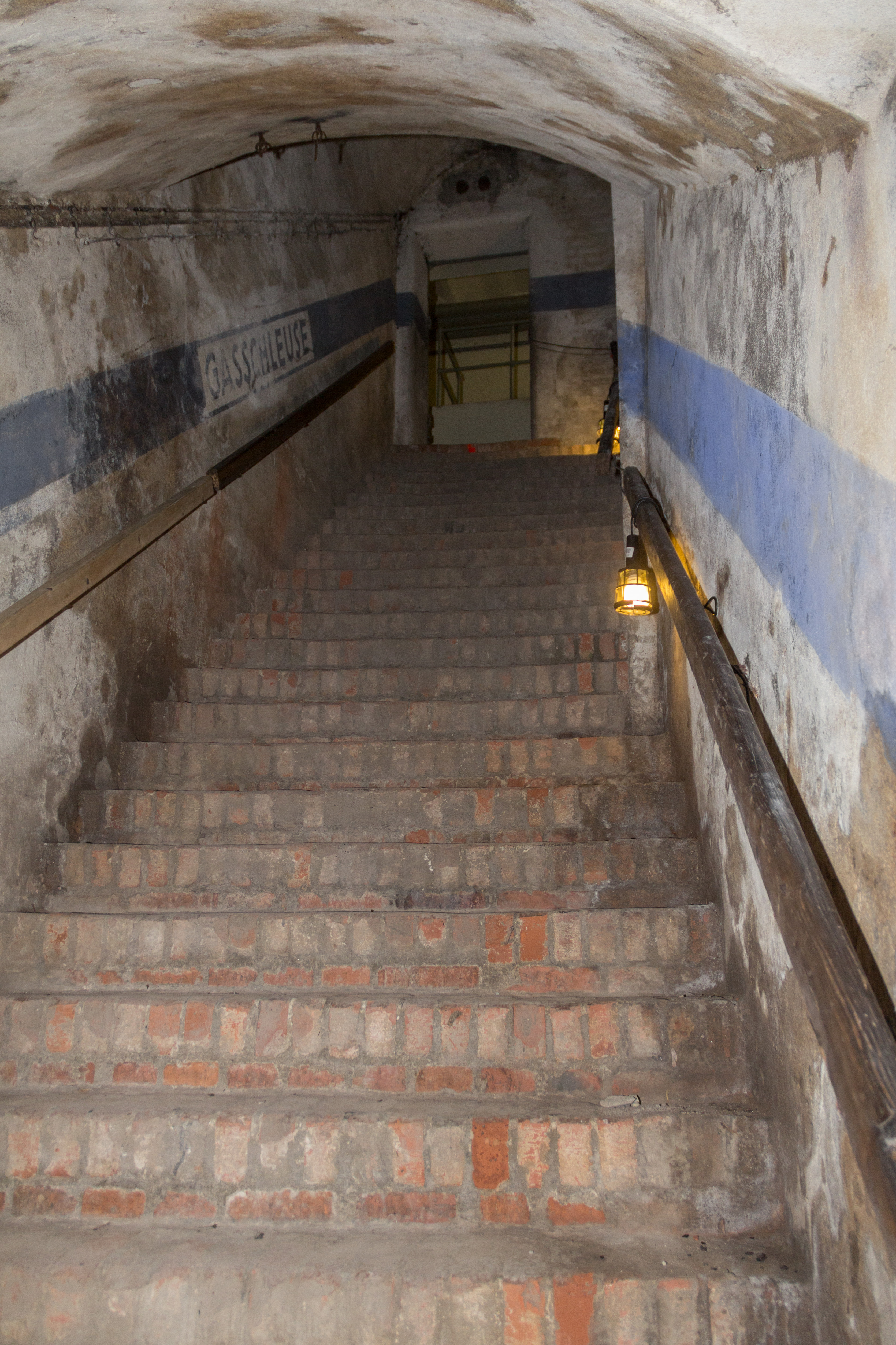 Paniersbunker, Aufgang Paniersschule